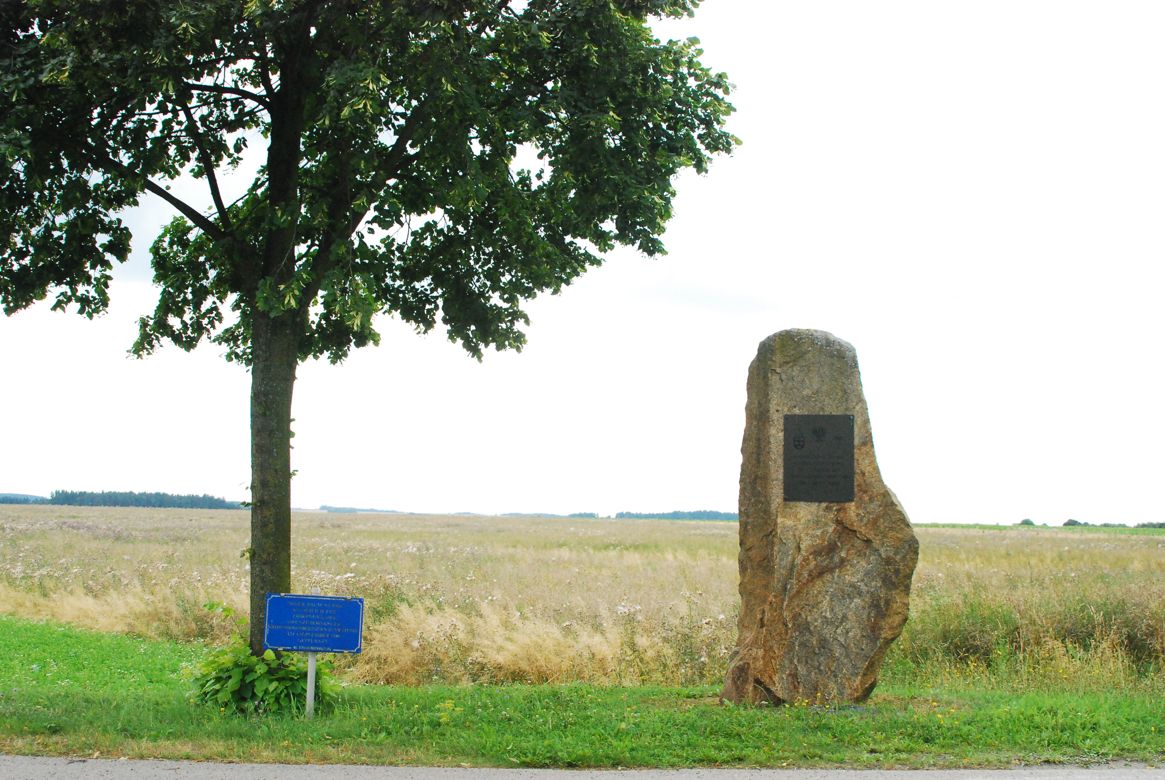 Baumpflanzung und Gedenkstein aus Anlass der Eröffnung des Grenzübergangs zwischen Oberthürnau und Vratenin 1990.